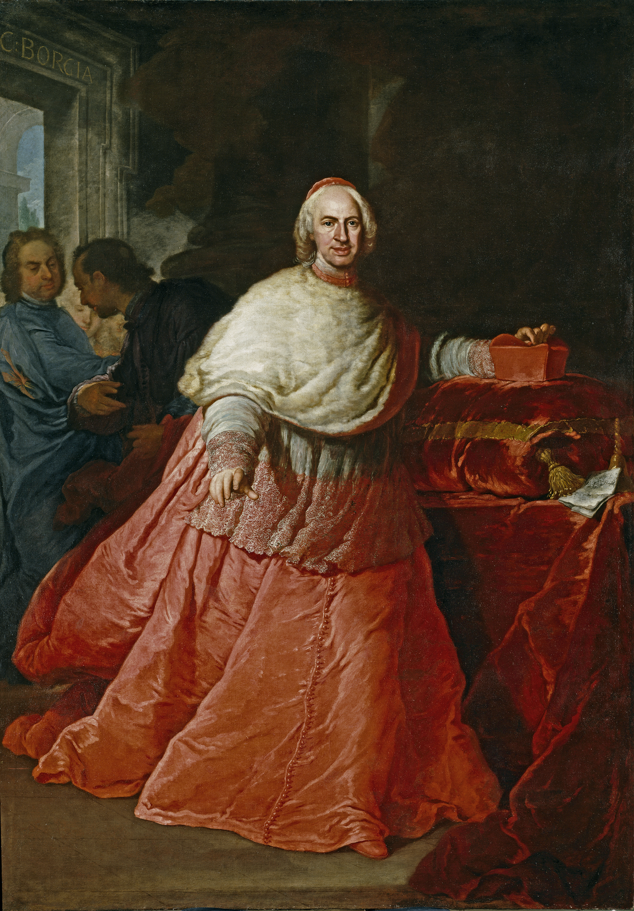 Retrato del cardenal español Carlos de Borja y Centellas (1663-1733), que llegó a ser patriarca de las Indias Occidentales y cardinal titular de Santa Prudenciana.